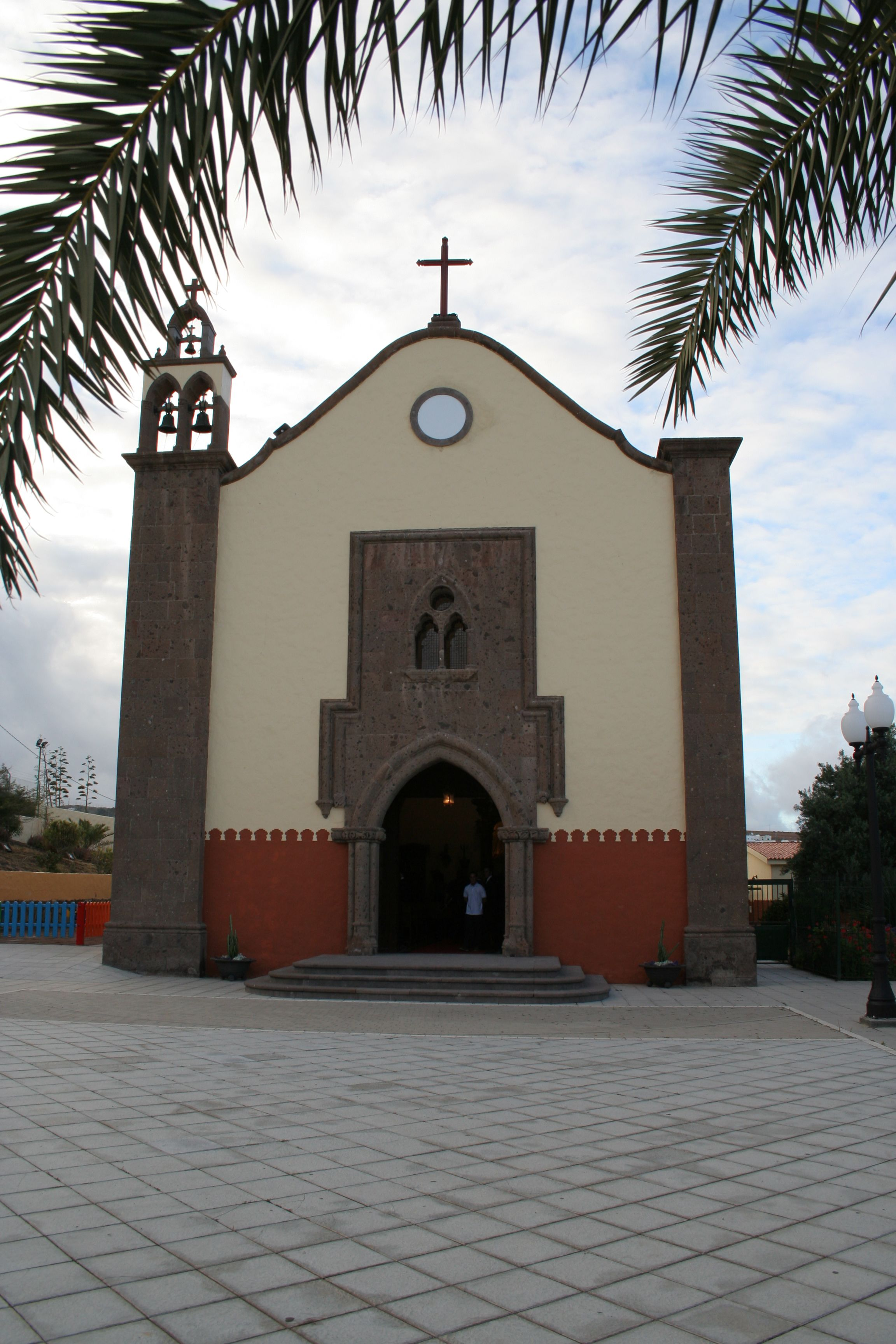 Iglesia del barrio de Tara en Telde (Gran Canaria)